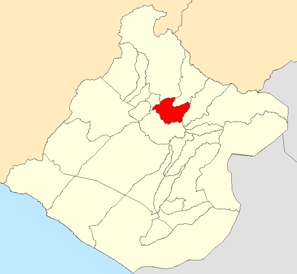 Mapa distrito Sitajara,Tacna - Perú